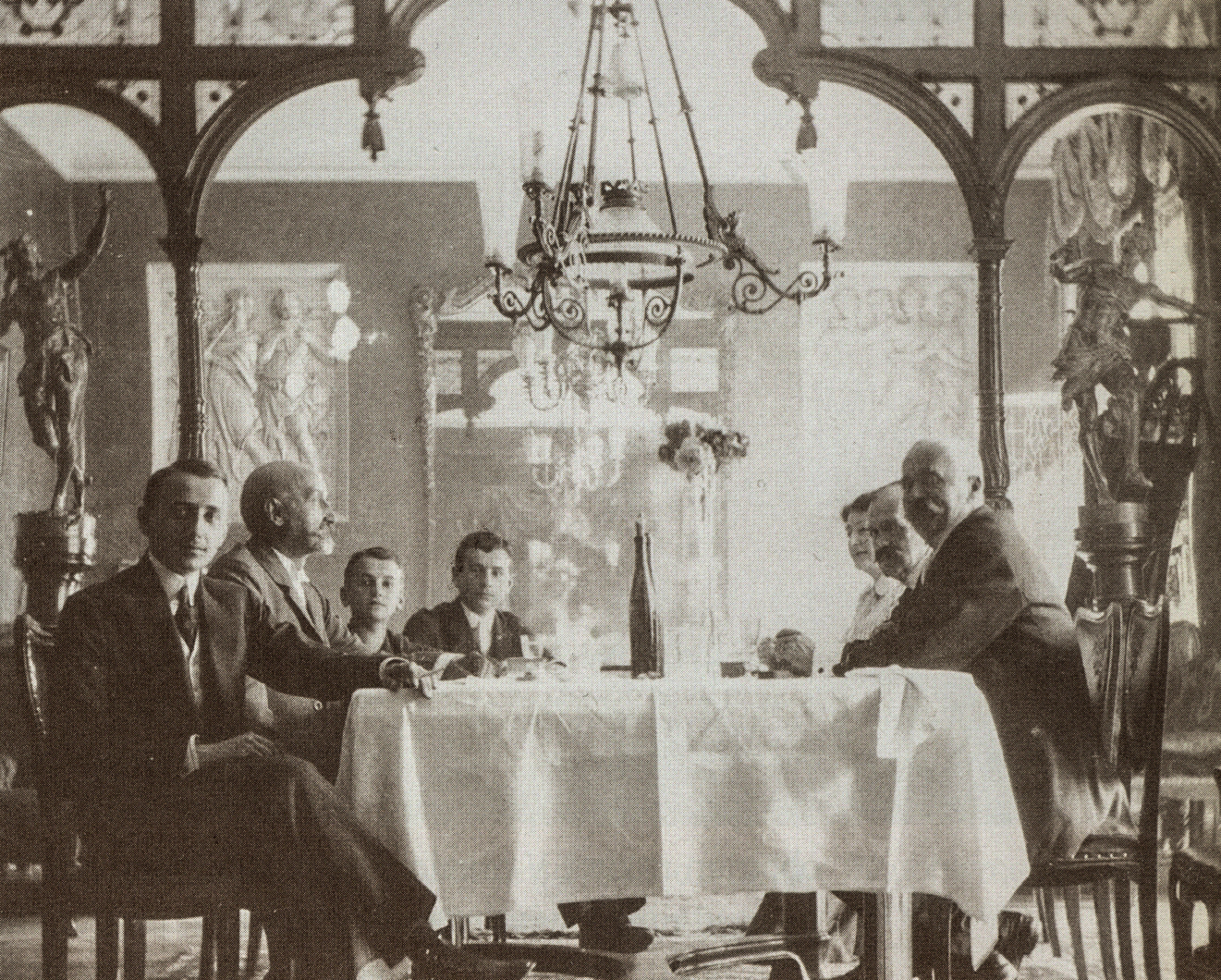 Oszkár Laubheimer in the circle a family and friends (second from left)label QS:Len,"Oszkár Laubheimer in the circle a family and friends (second from left)" label QS:Lhu,"Laubheimer Oszkár családi és baráti körben (balról a második) otthonában. Ez a helyiség ma a lendvai könyvtár olvasóterme"